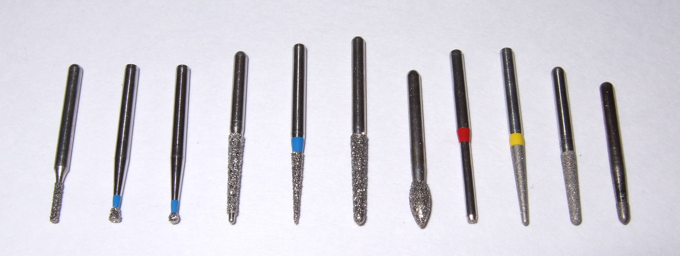 Soān-chio̍h bôa-chiam